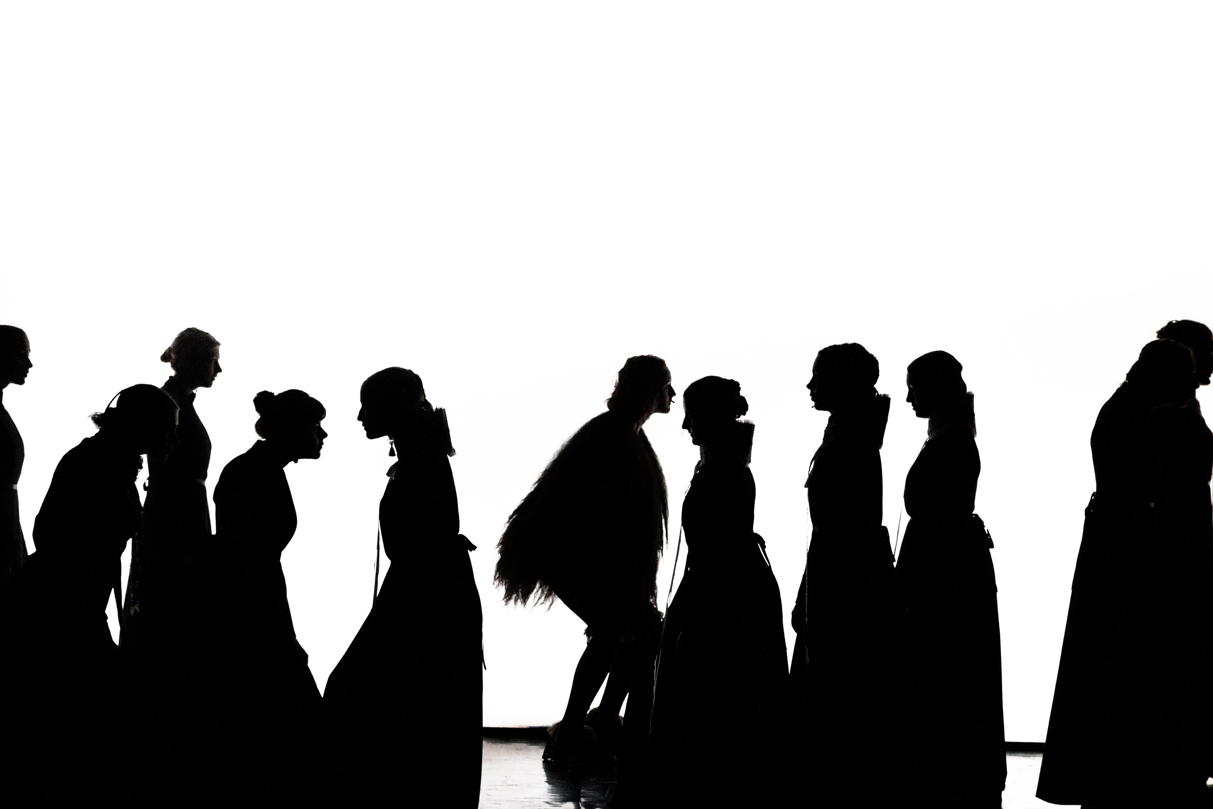 Carmina Slovenica, avtor Dorian Šilec Petek, projekt Fortuna Fauvelu ne bo par!